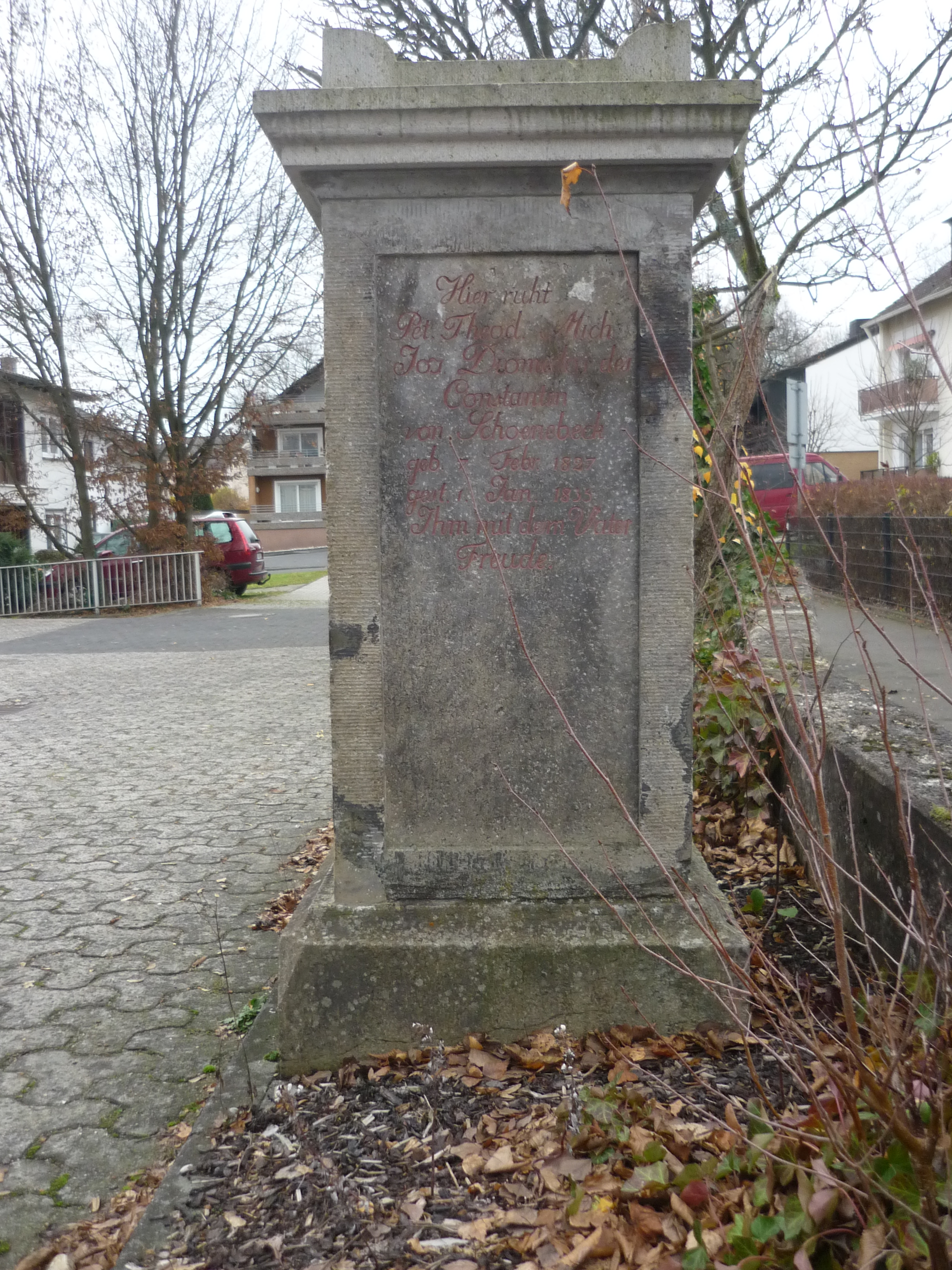 ehemaliger Grabstein von Schoenebeck, vor dem Gesundheitsamt Altenkirchen/Ww.